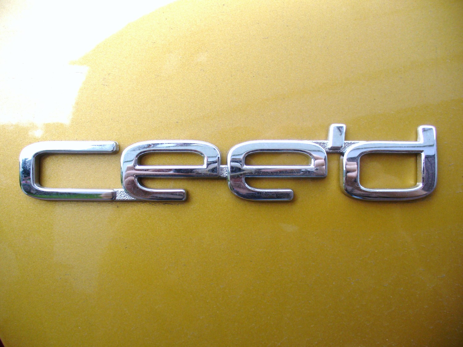 Kia pro_cee'd